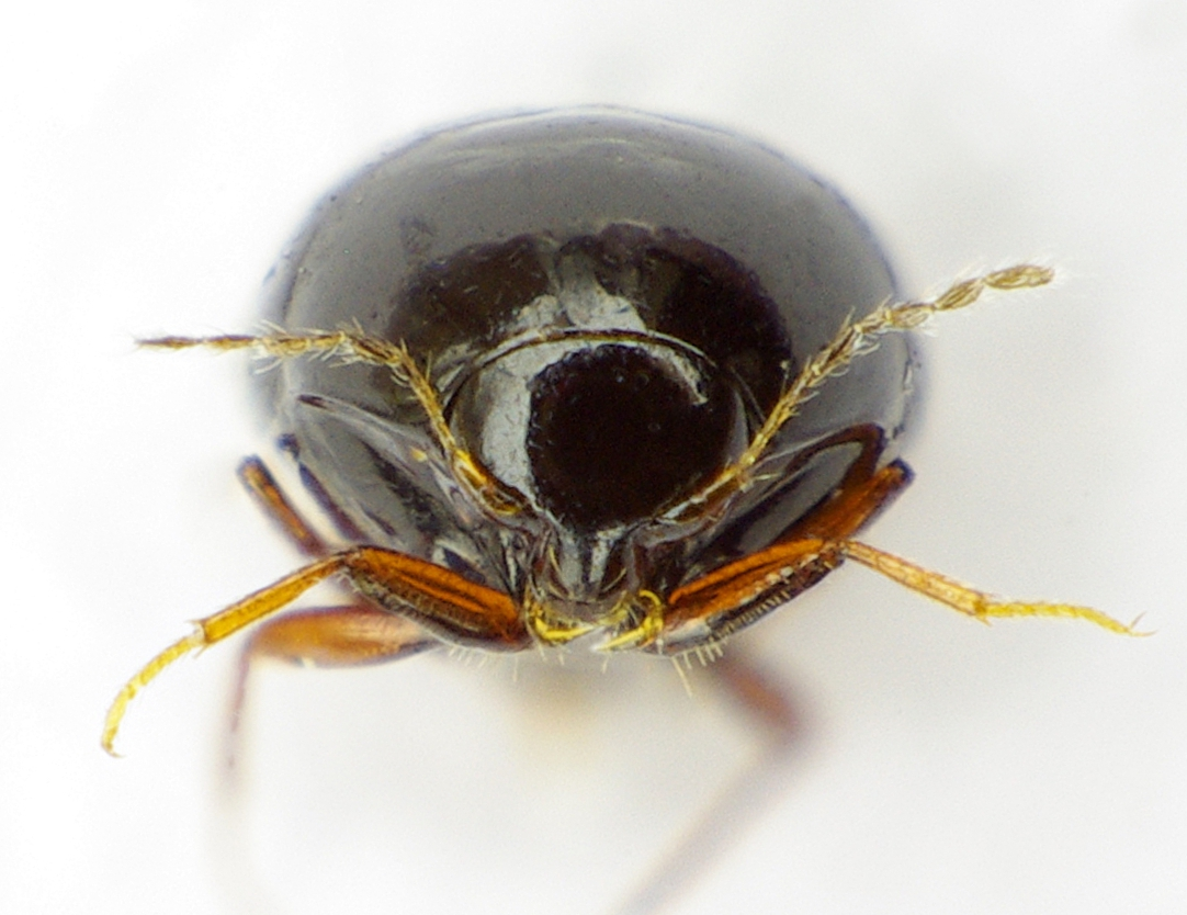 Scaphisoma agaricinum aus Süddeutschland zwischen Rottweil und Tuttlingen, 700 m.ü.M auf schimmelndem Altholz, Vorderansicht